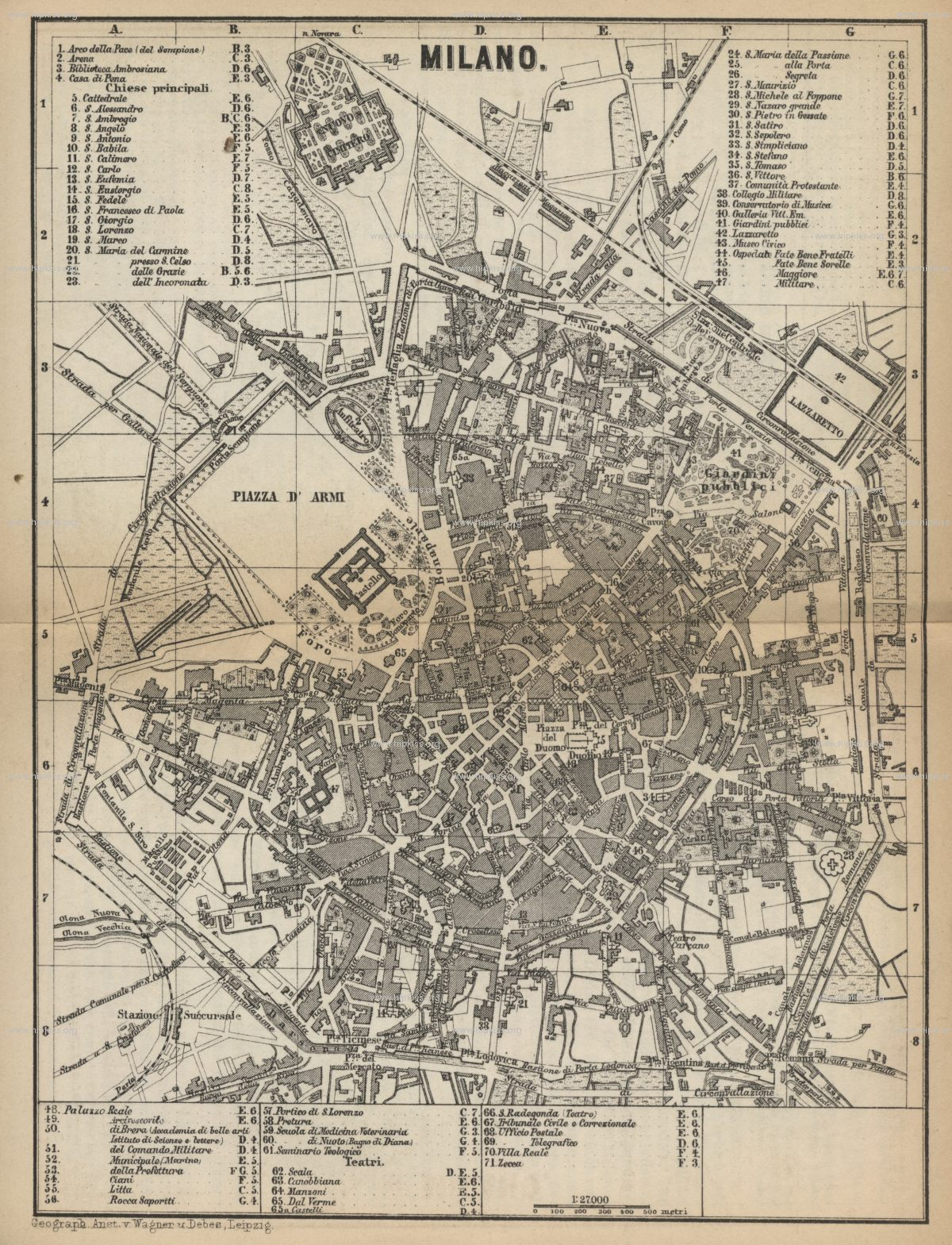 Map of Milan, Baedekers_switzerland_1881